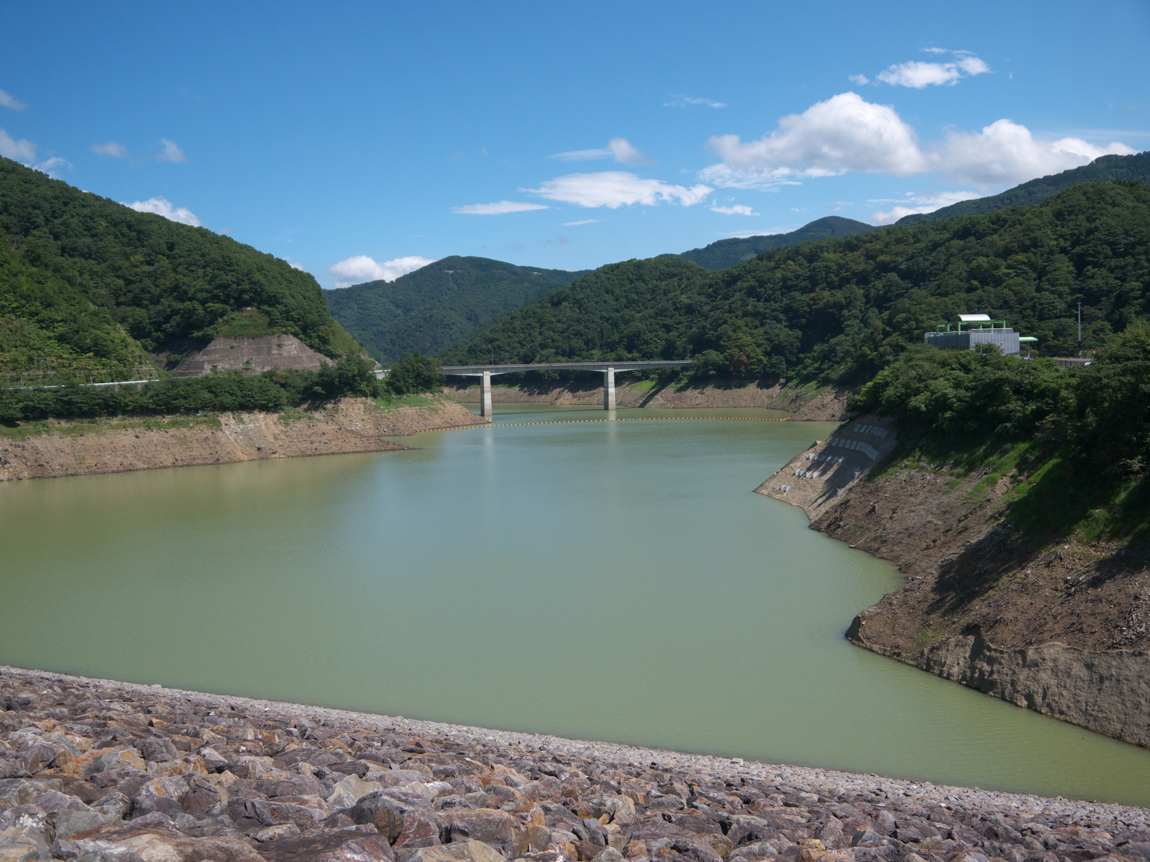 桝谷湖とダムに渡る群青